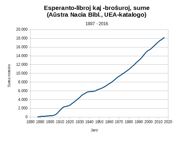 Suma nombro de Esperanto-eldonaĵoj (libroj ekde 49 paĝoj kaj broŝuroj) laŭ la statistikoj de la Biblioteko Hodler kaj (ekde proks. 1987) de la Aŭstra Nacia Biblioteko. Dankon al Miroslav Malovec pro la kunigo de datumoj.